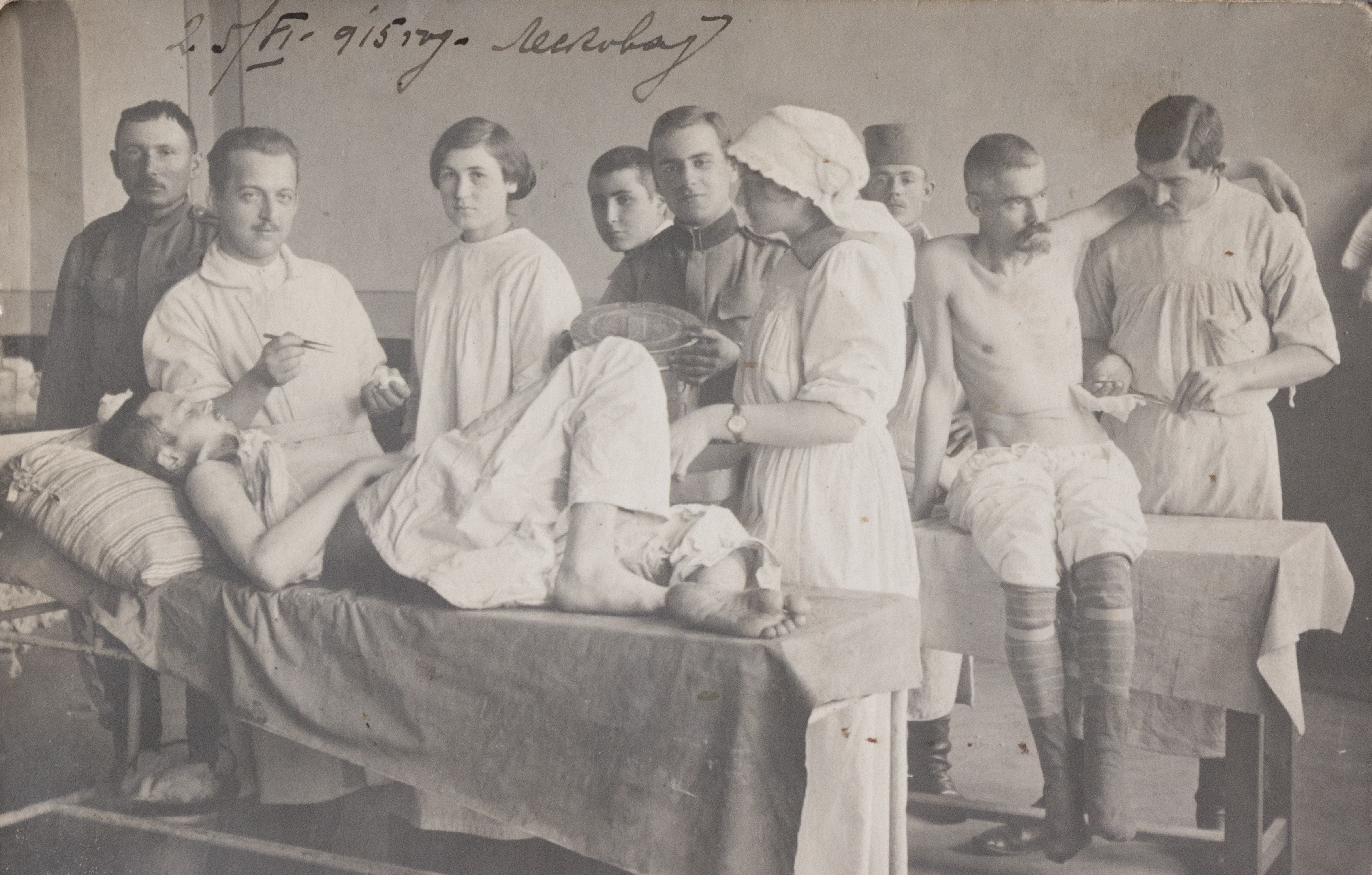 Smilja Kostić, previjanje ranjenika, 1915